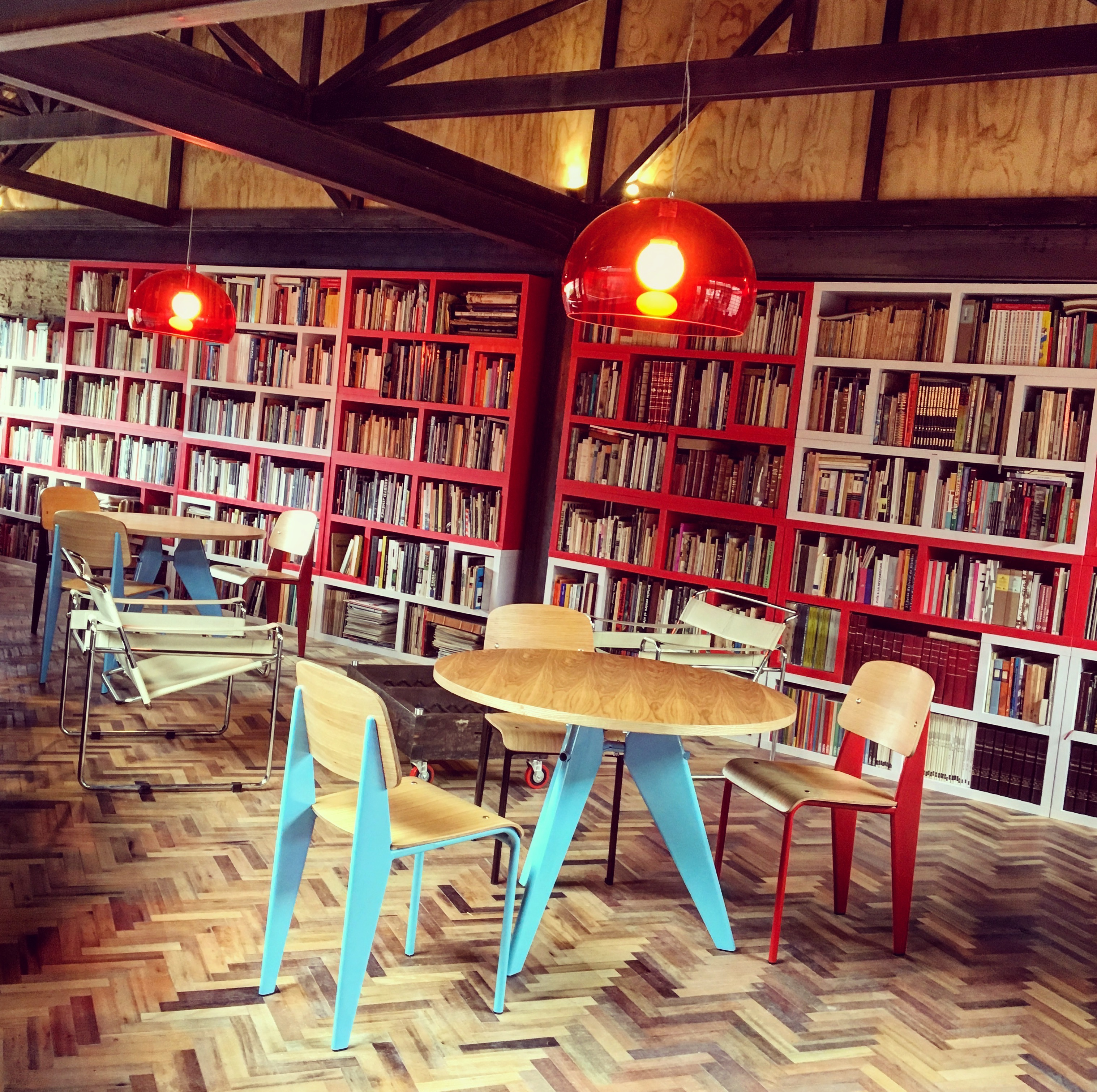 General view of reading room, in Arkhé.